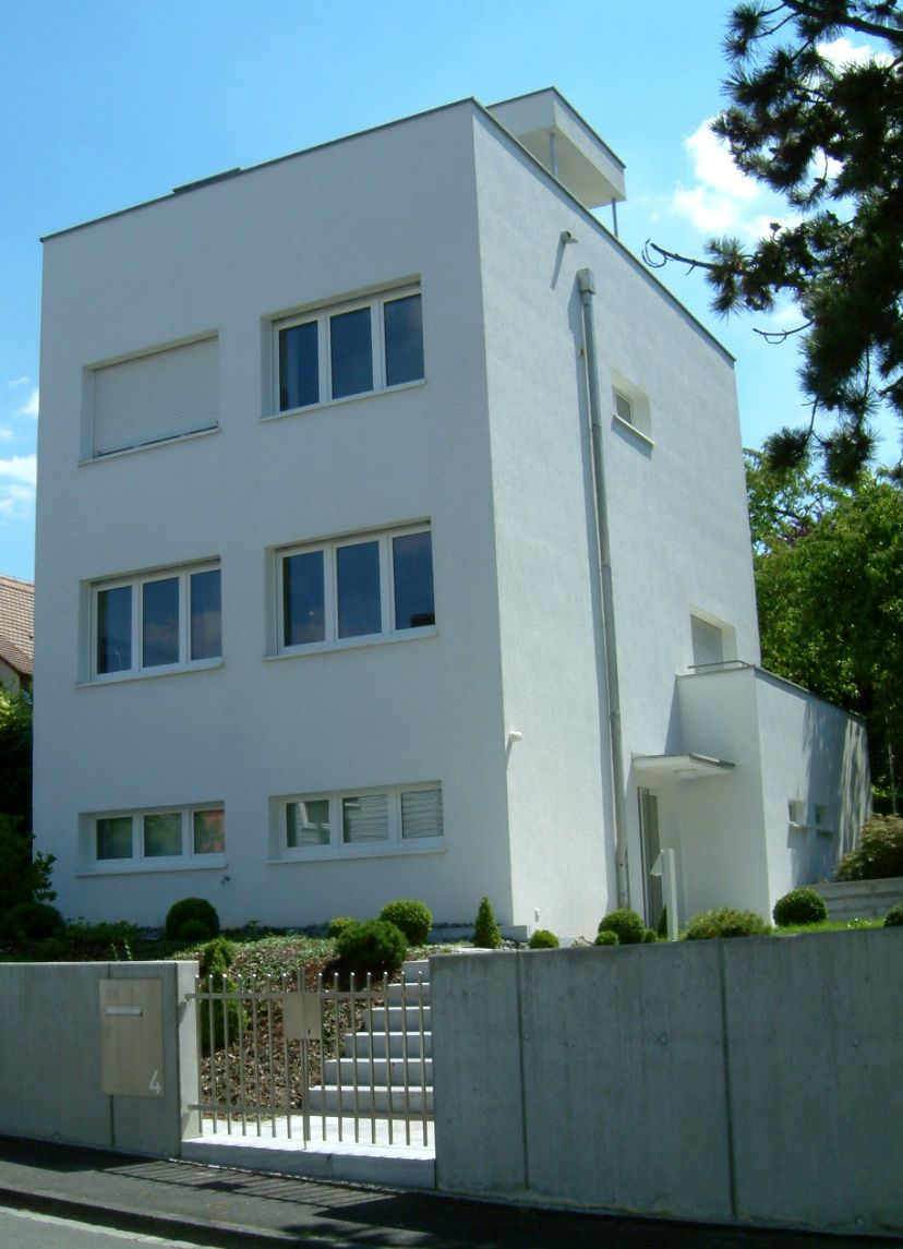 Arch. Peter Feile, Würzburg, Lerchenhain 4